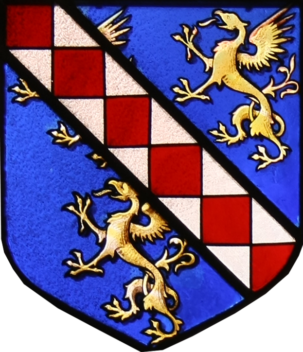 Blason d' Etienne Marcel, prévost des marchands.